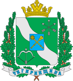 Герб Чигиринського району